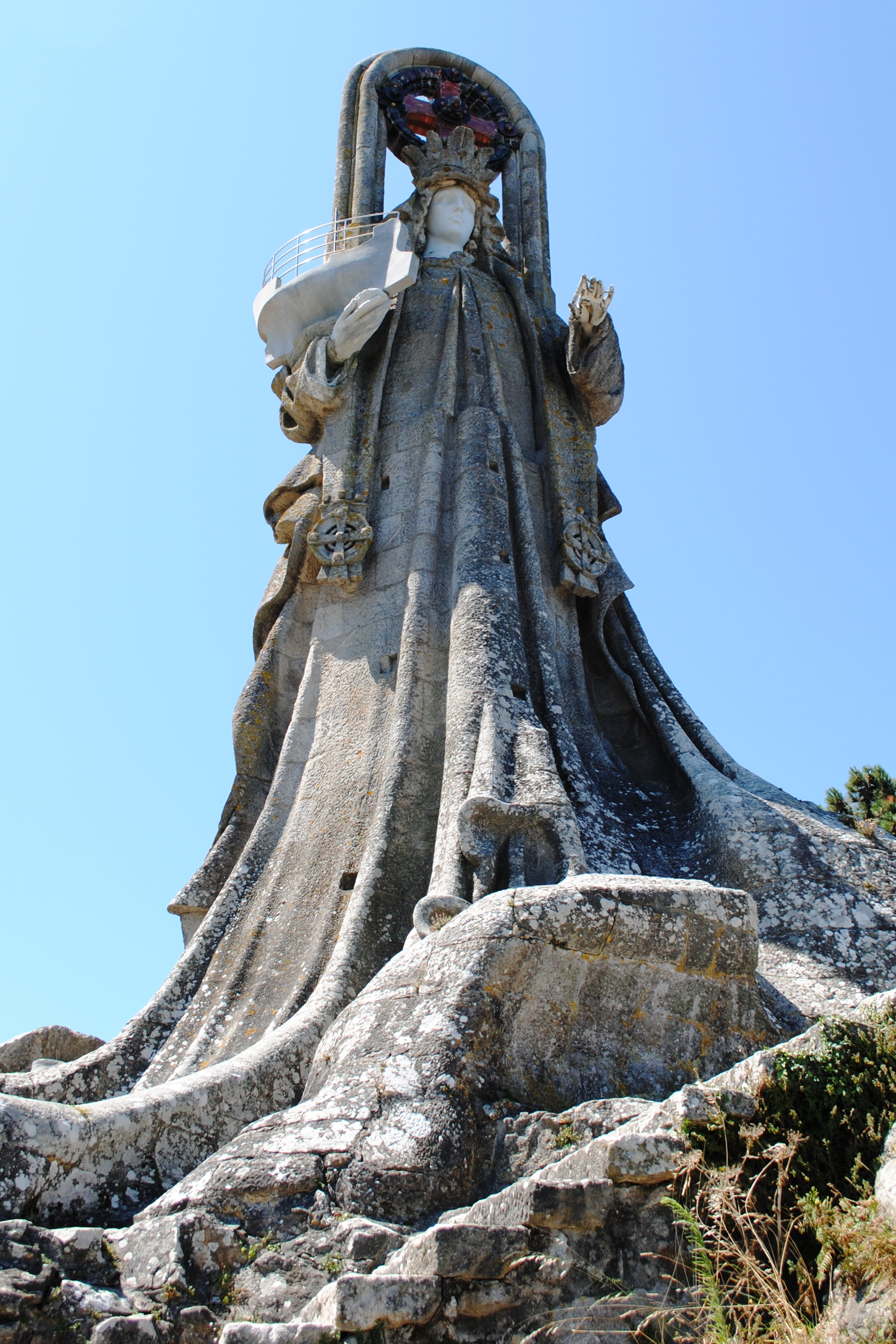 Virxe da Rocha, Baiona, Antonio Palacios.